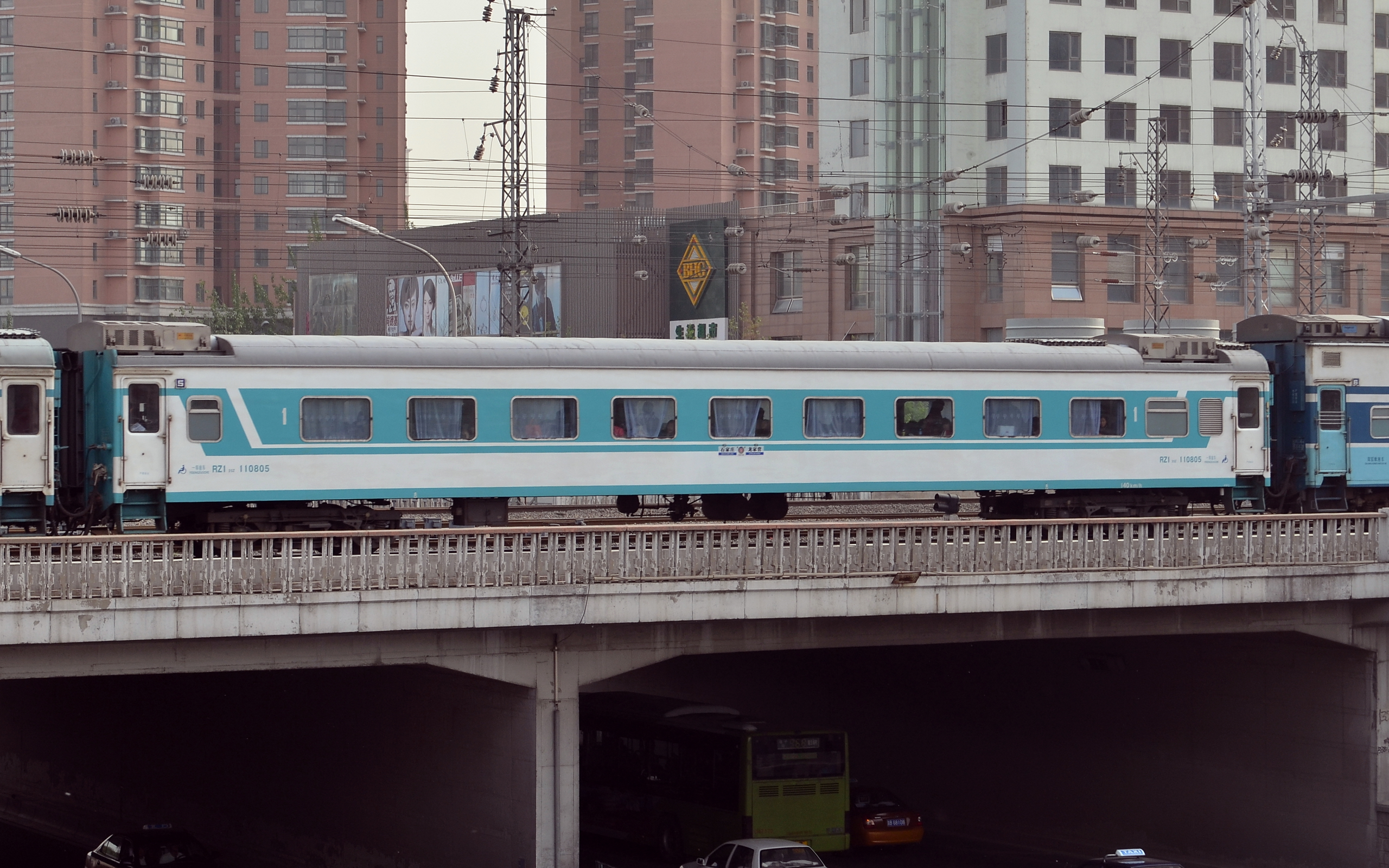 北京西至石家庄T5681次列车编组中的RZ1 25Z一等座车，车体标记有“１”